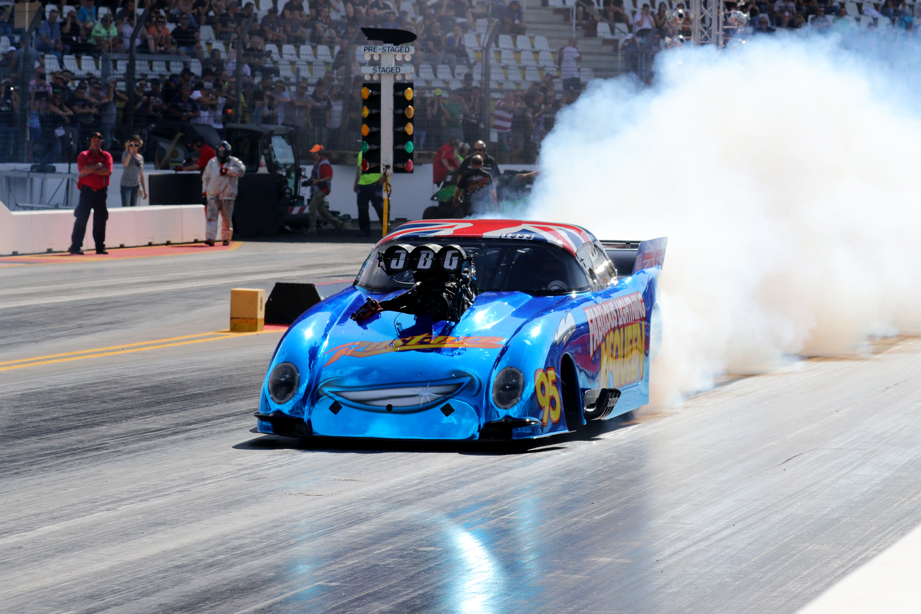 Drag Racing (FIA): Burnout eines Pro Modified Cars / John Tebenham (GBR)